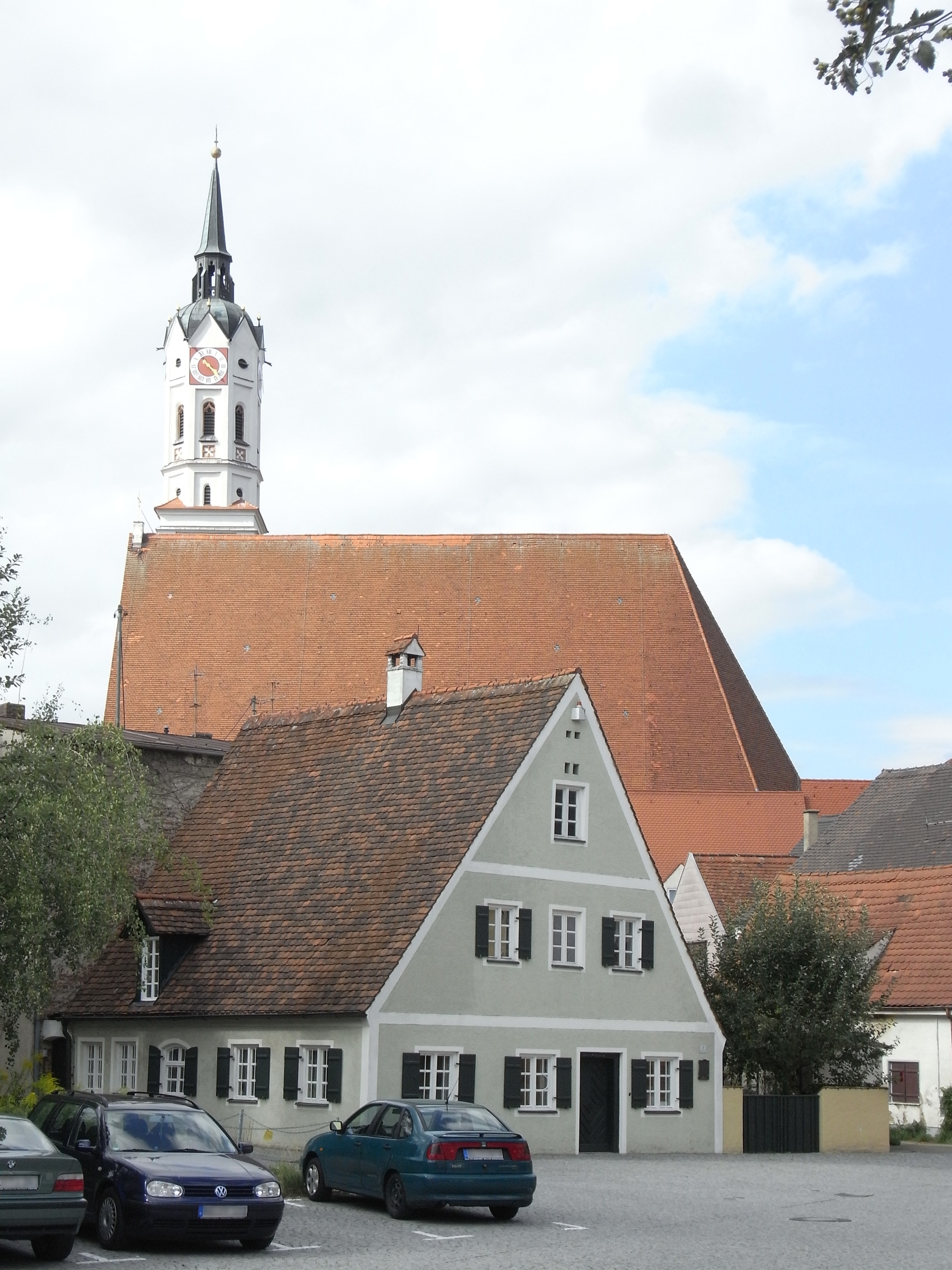 Schrobenhausen, Stadtpfarrkirche St. Jakob, von Süden gesehen. Im Vordergrund das Zeislmairhaus (1478; In der Lachen 1).